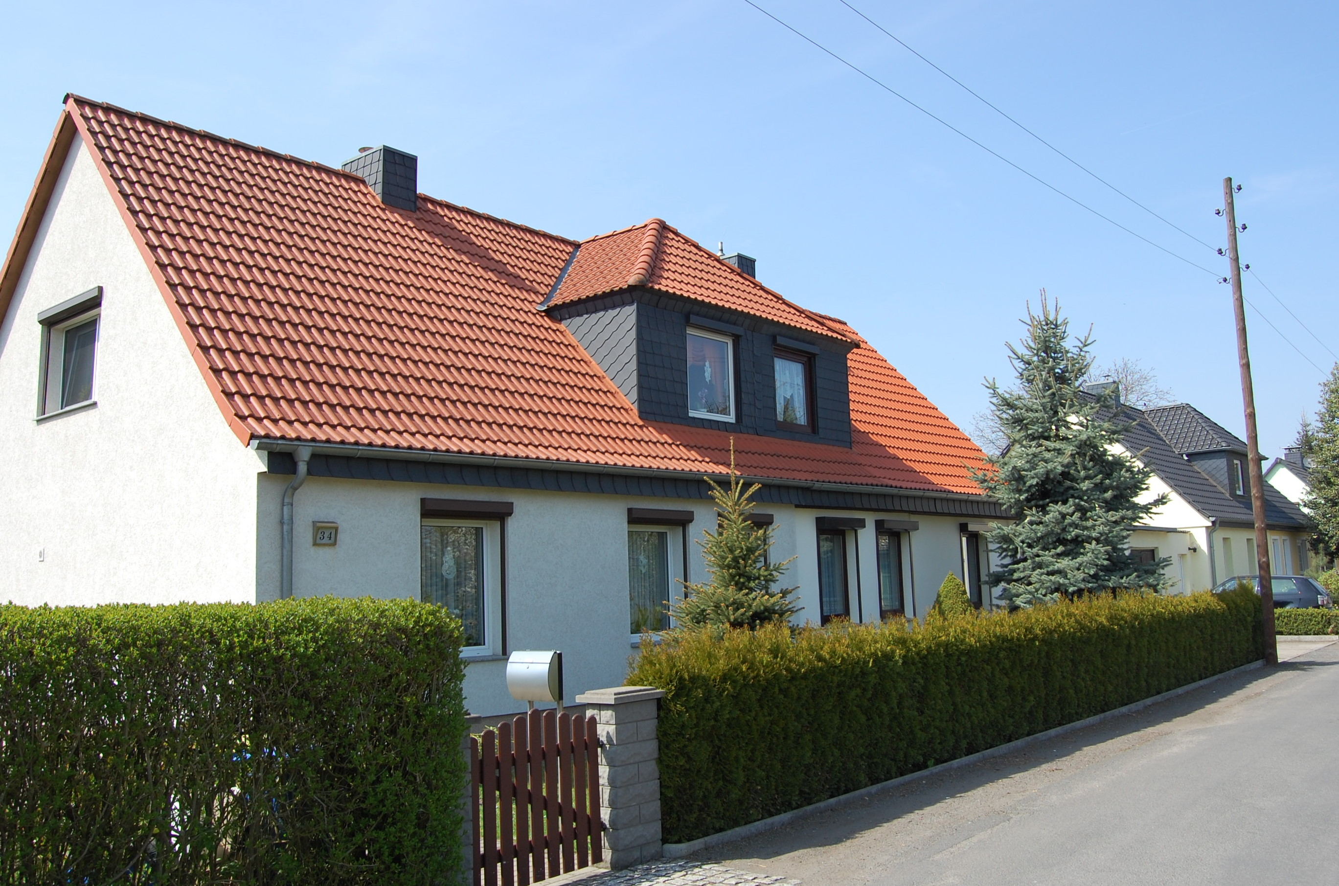 Häuser im Damschkeweg in Lüttgen-Salbke